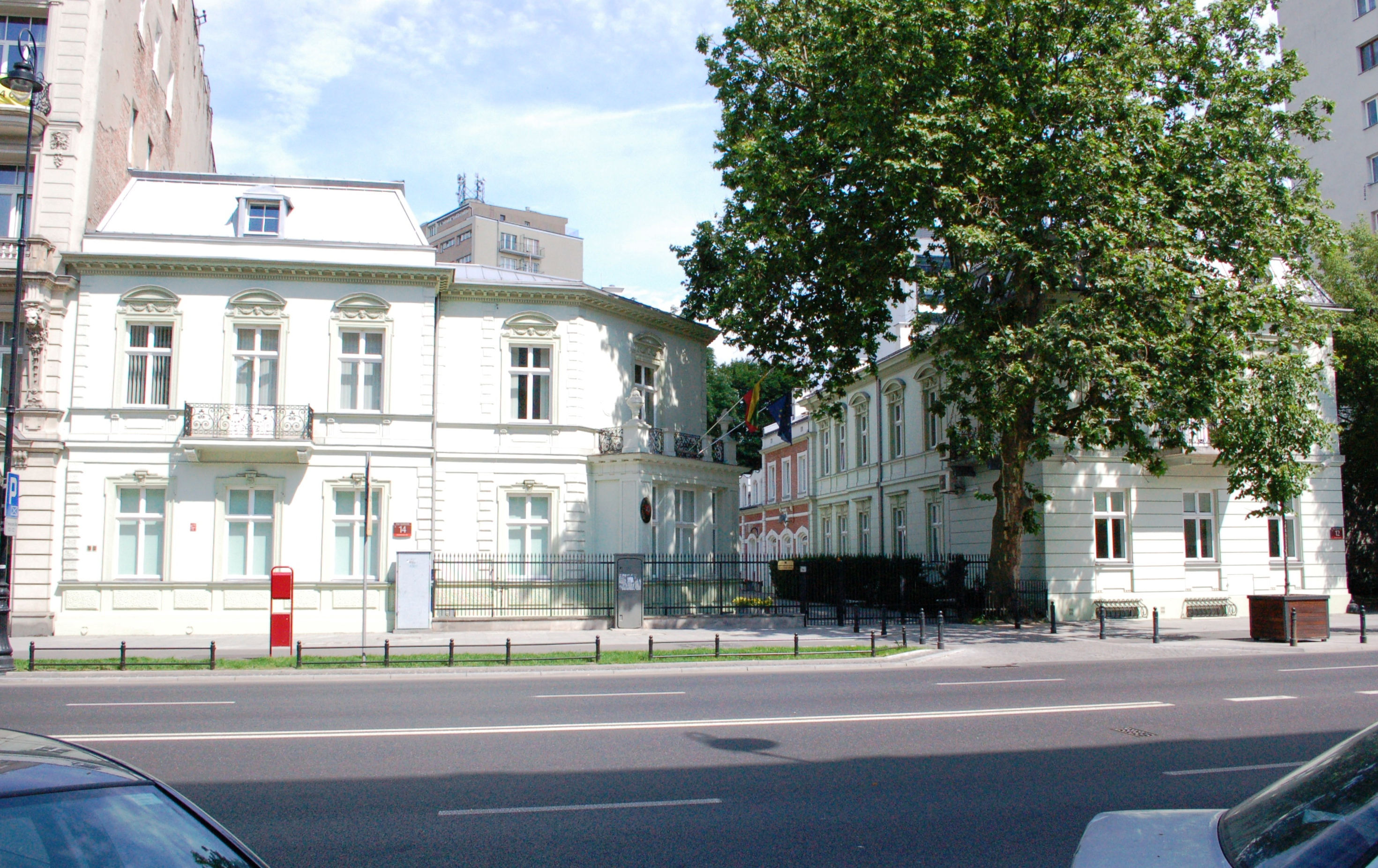 Warschau